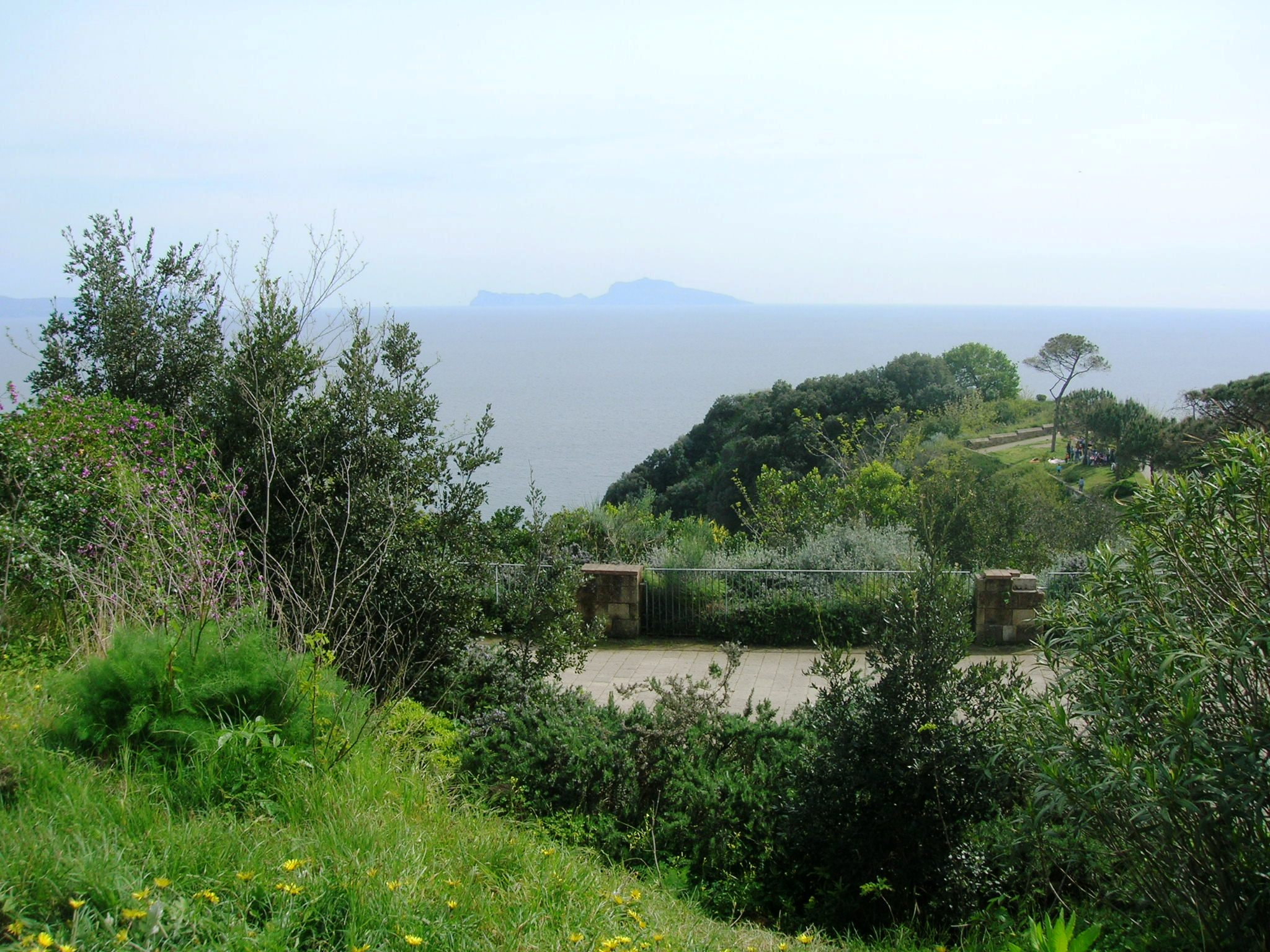 Parco Virgiliano di Napoli